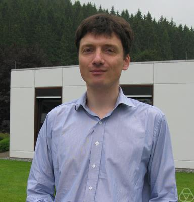 Foto di Peter Topping